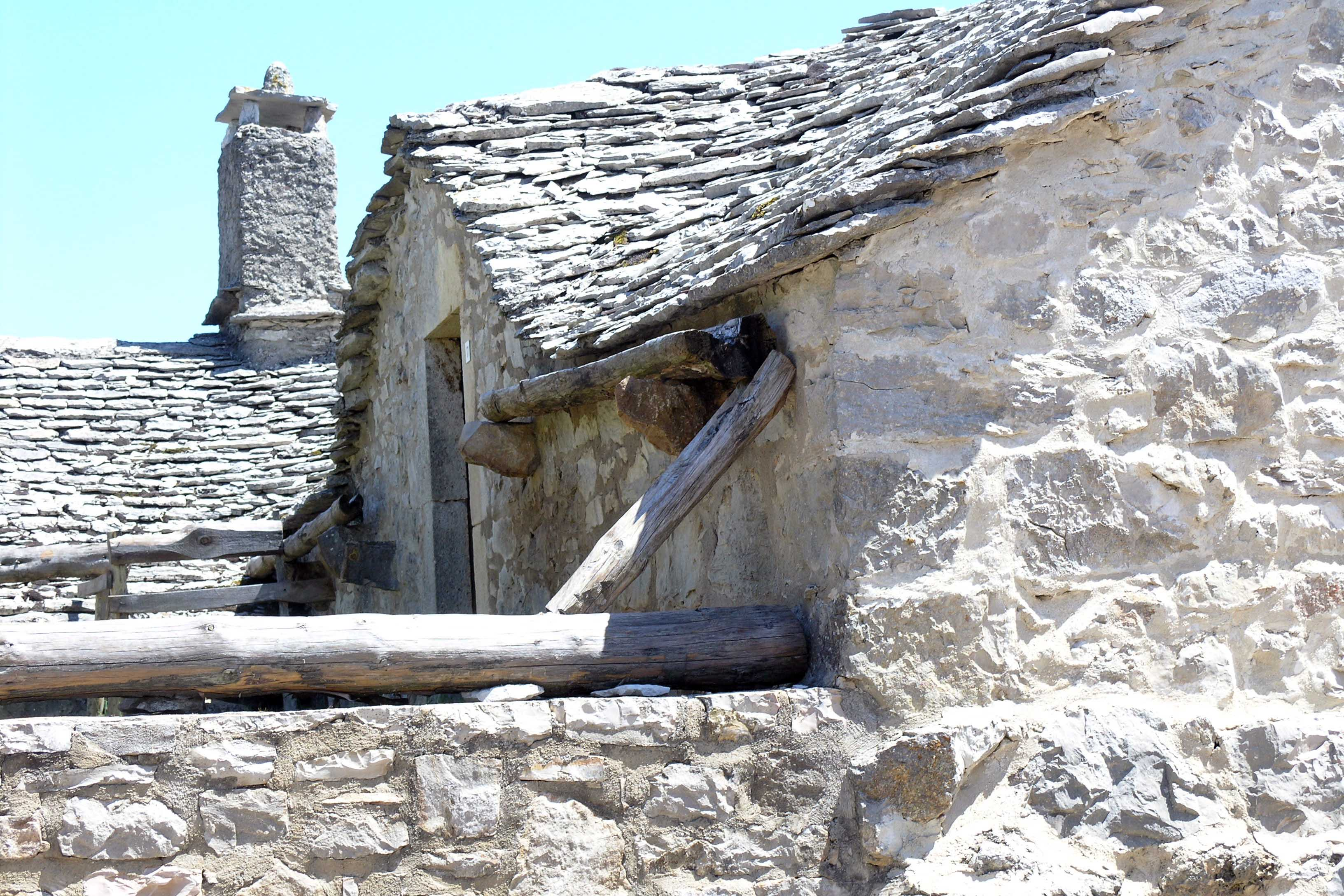 Ferme caussenarde, Languedoc, France